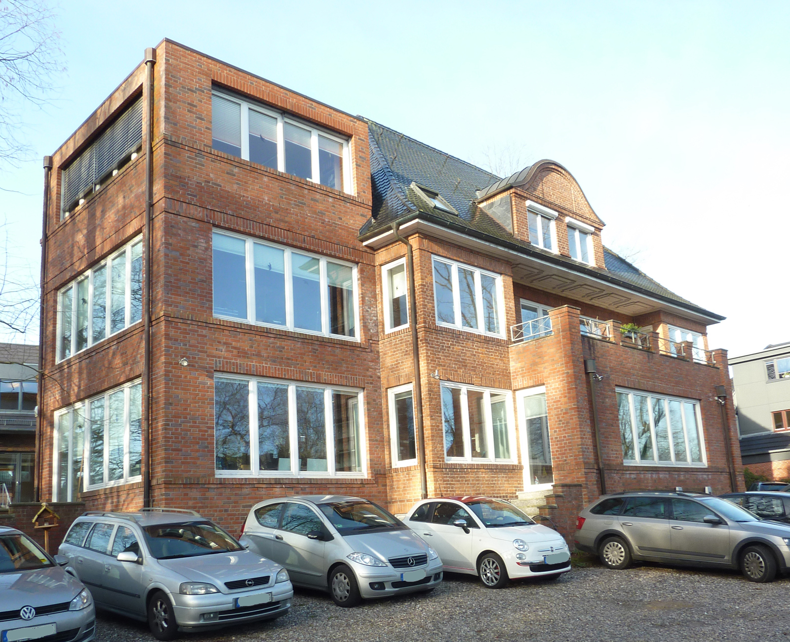 Hauptgebäude und Verwaltungssitz der Stiftung Naturschutz Schleswig-Holstein